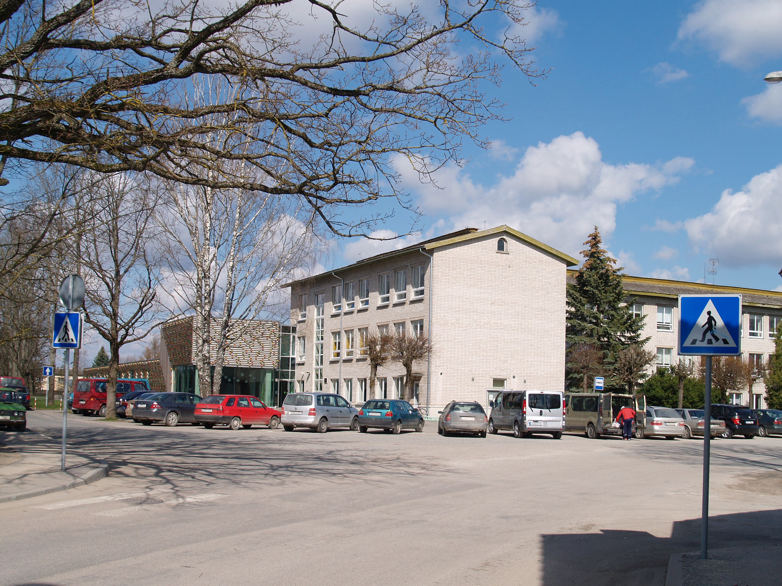 Suure-Jaani Gümnaasium